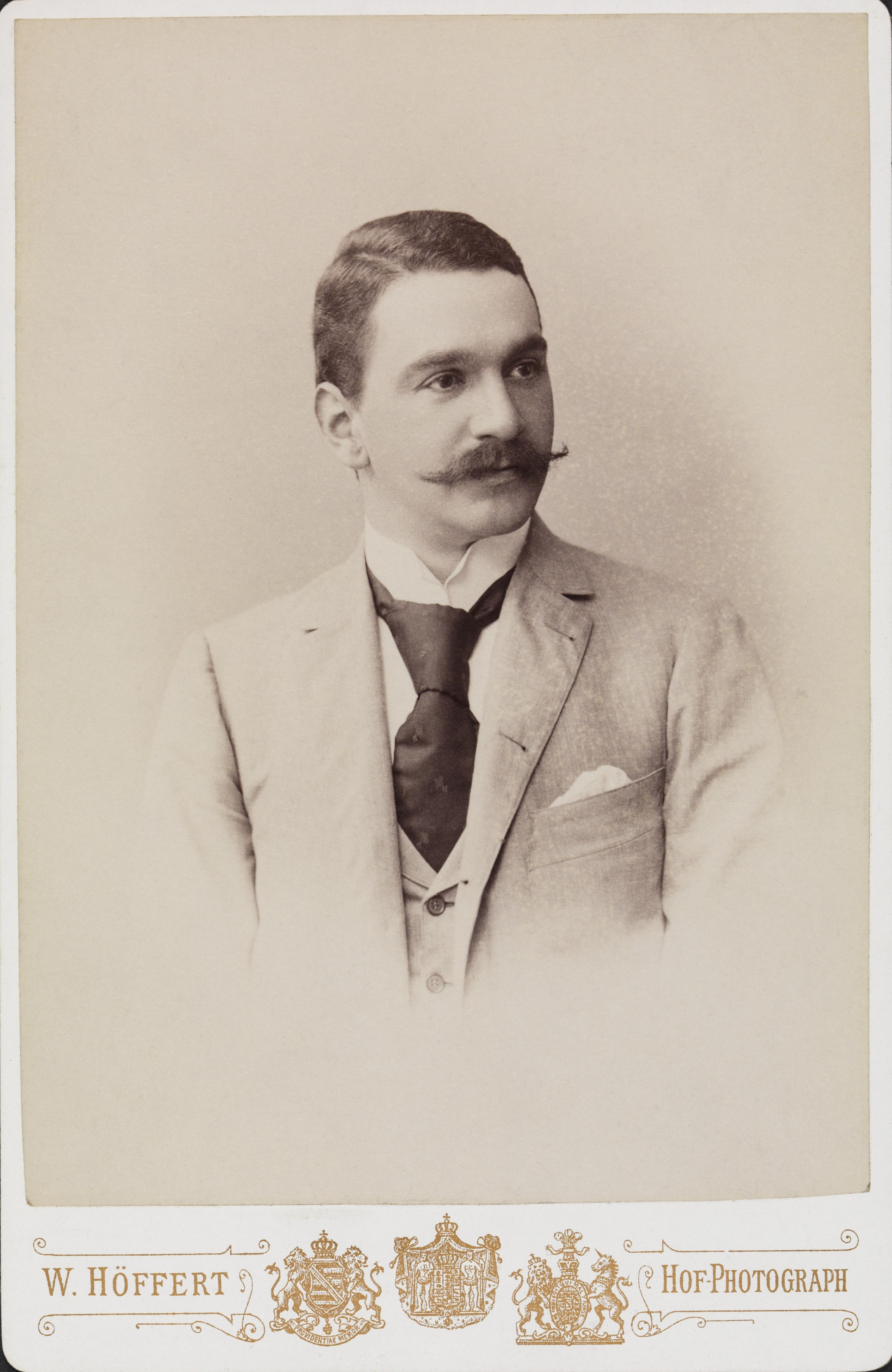 Bildet er hentet fra Nasjonalbibliotekets bildesamling Depicted person: Eyde, Sam